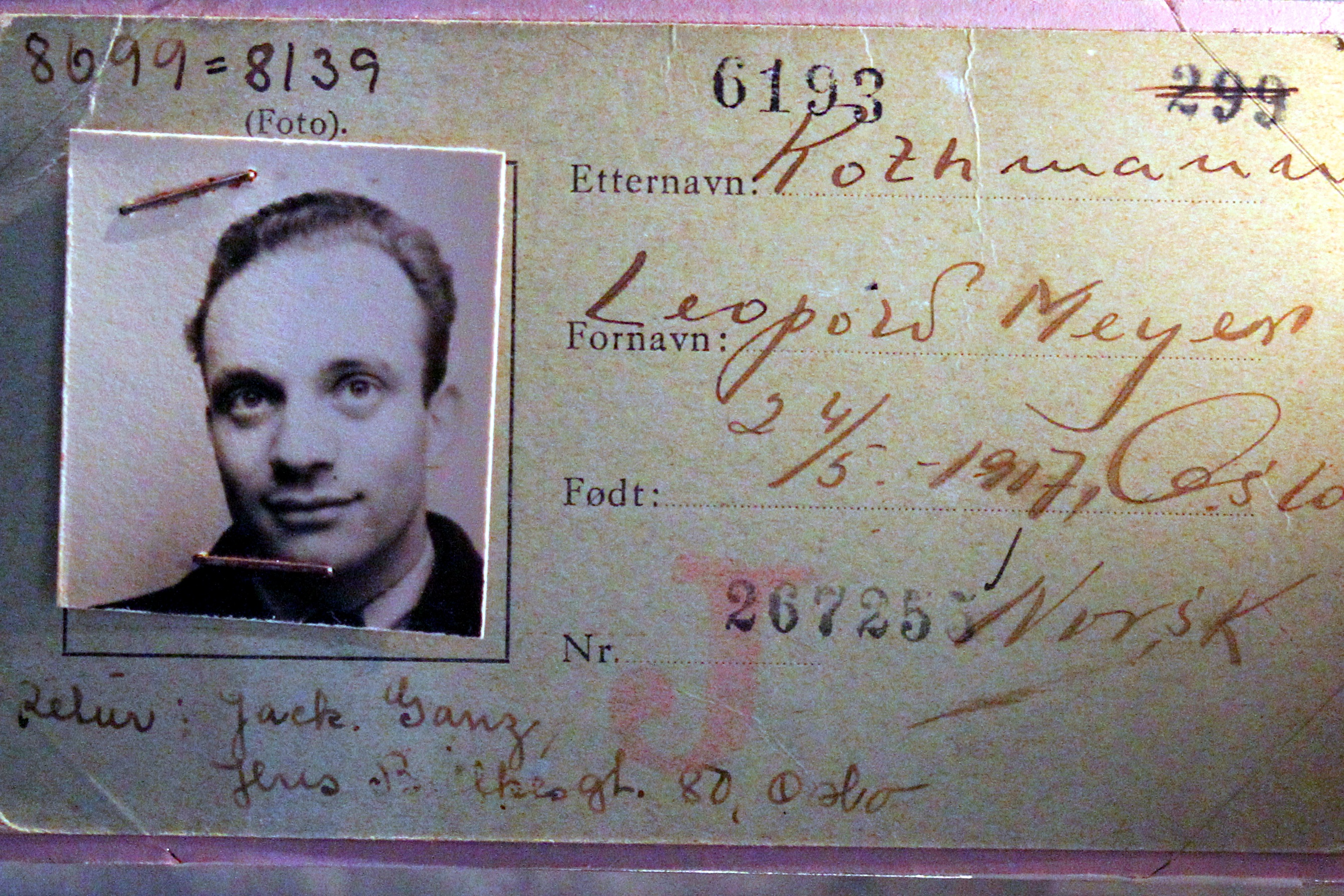 Passet til Leopold Meyer Rothmann, stemplet med rød "J". Rothmann ble drept i Auschwitz den 13. januar 1943. På utstilling hos Senter for studier av Holocaust og livssynsminoriteter.